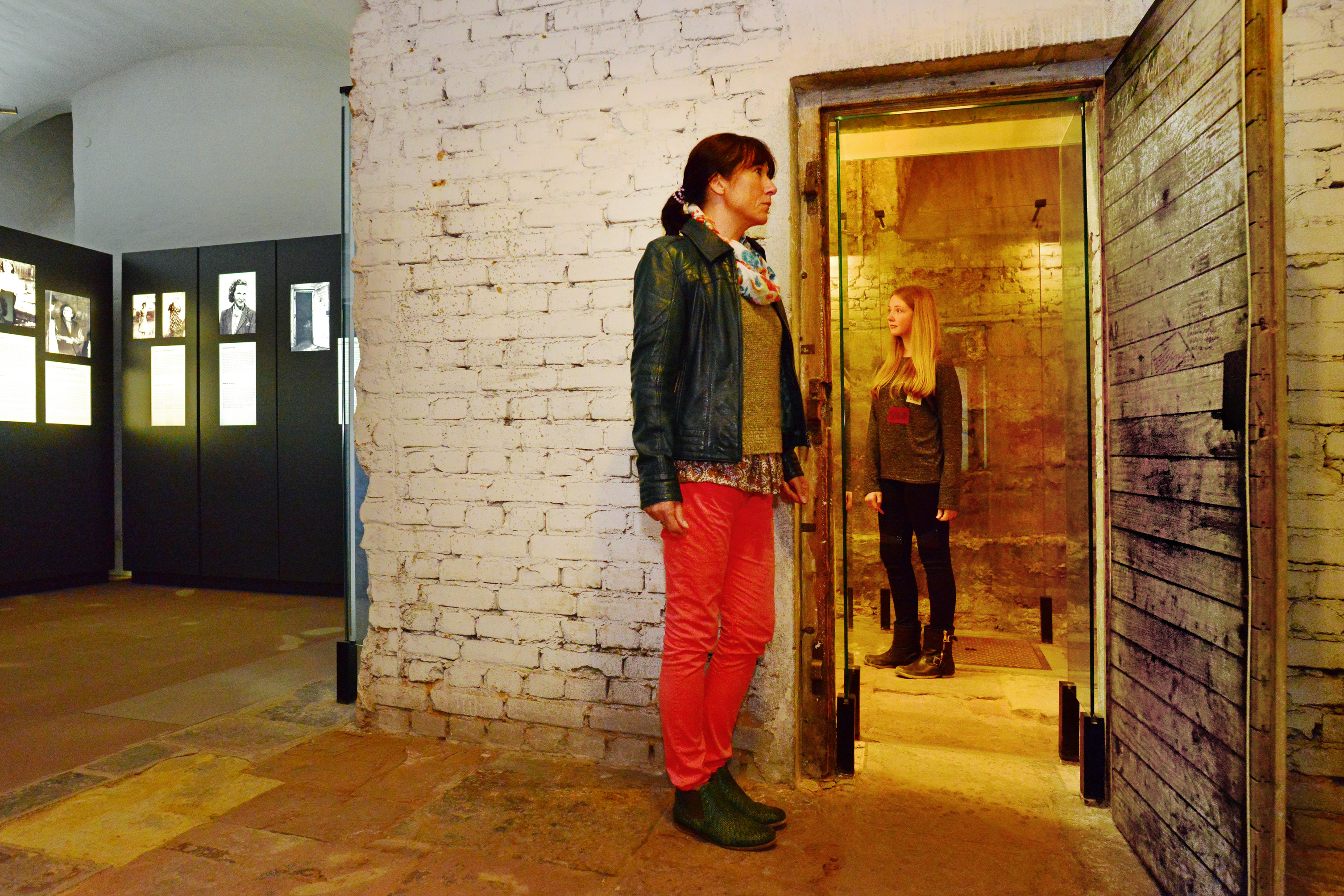 © Historisches Museum Saar, Thomas Roessler